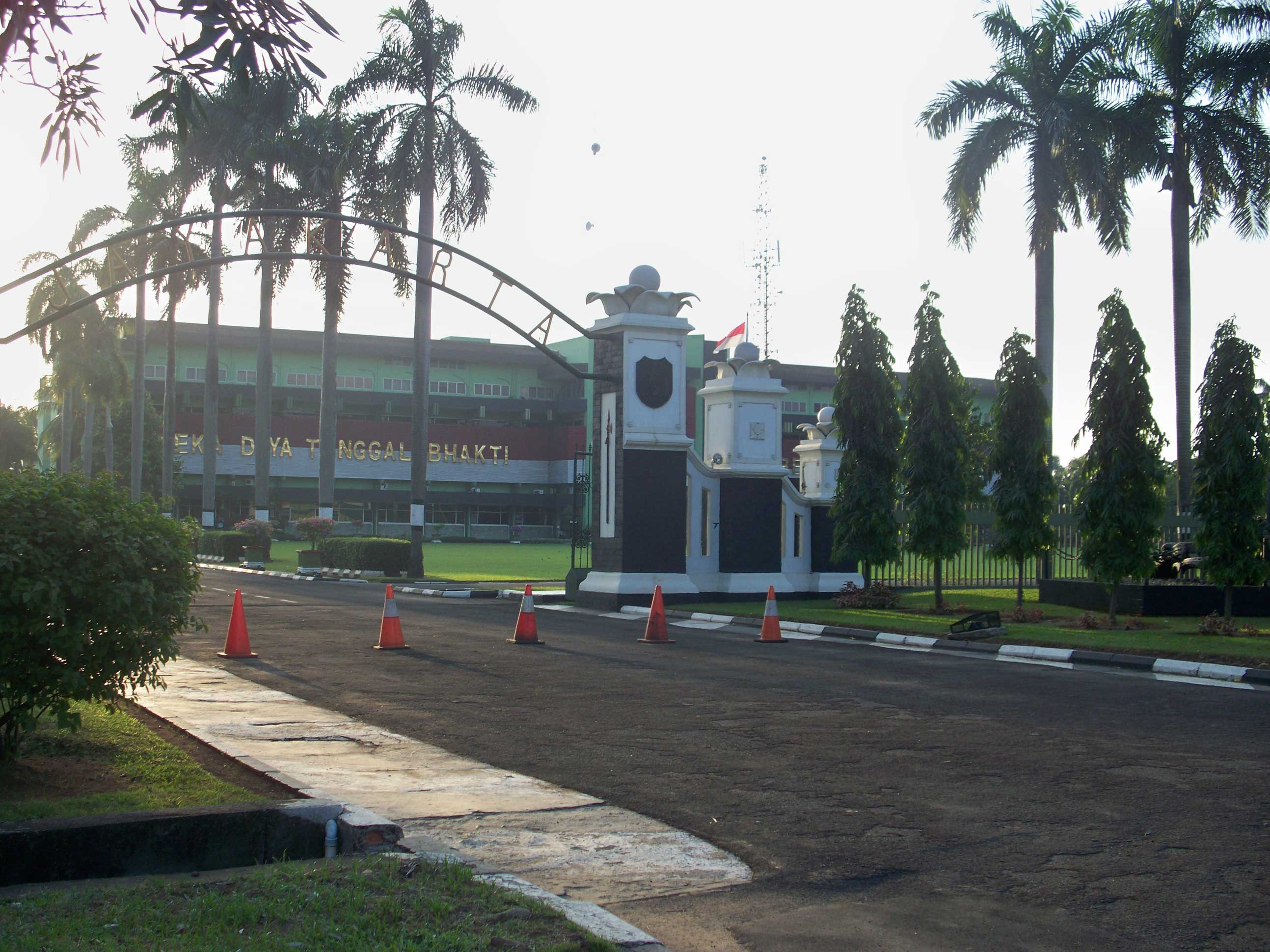 Markas Kodam Jaya